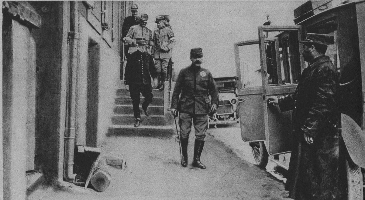 les généraux Augustin Dubail (premier plan) et Sarail [sur les marches) à leur Q.G en Argonne en 1915.